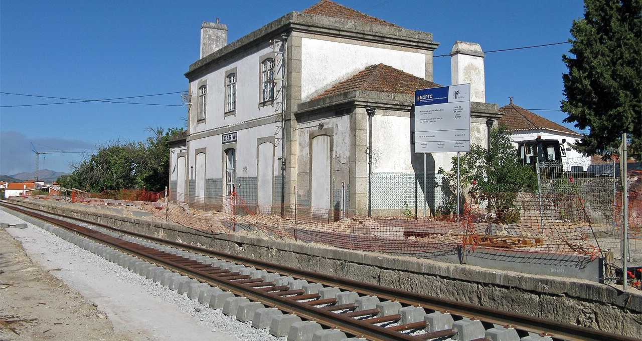 Estado das obras da Linha da Beira Baixa entre Caria e Belmonte. Estado da linha junto ao apeadeiro de Caria a 30 de Julho de 2009.